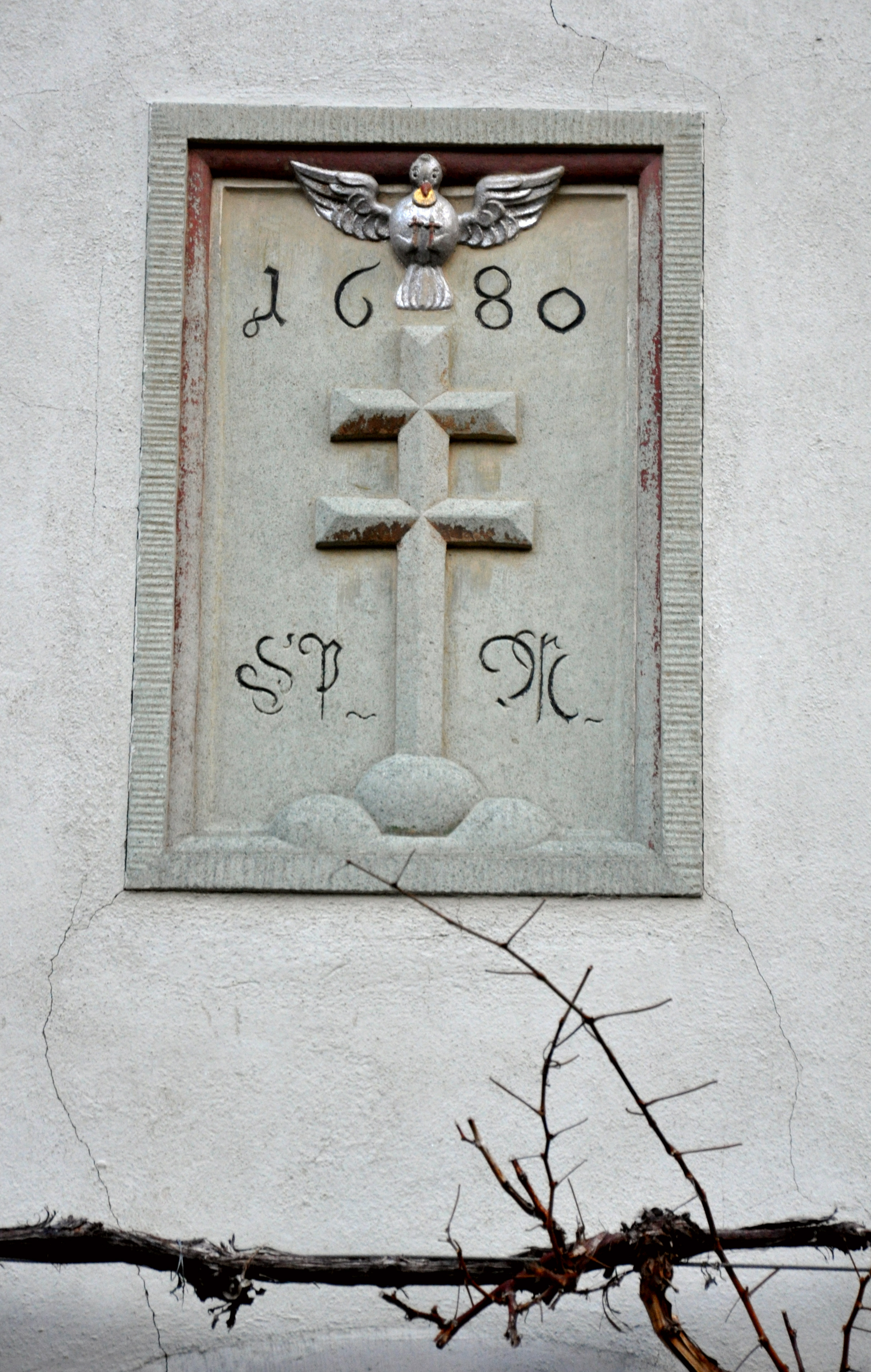 Weinbaumuseum Meersburg (ehem. Hl.-Geist-Torkel), Relief 1680 über dem Eingang